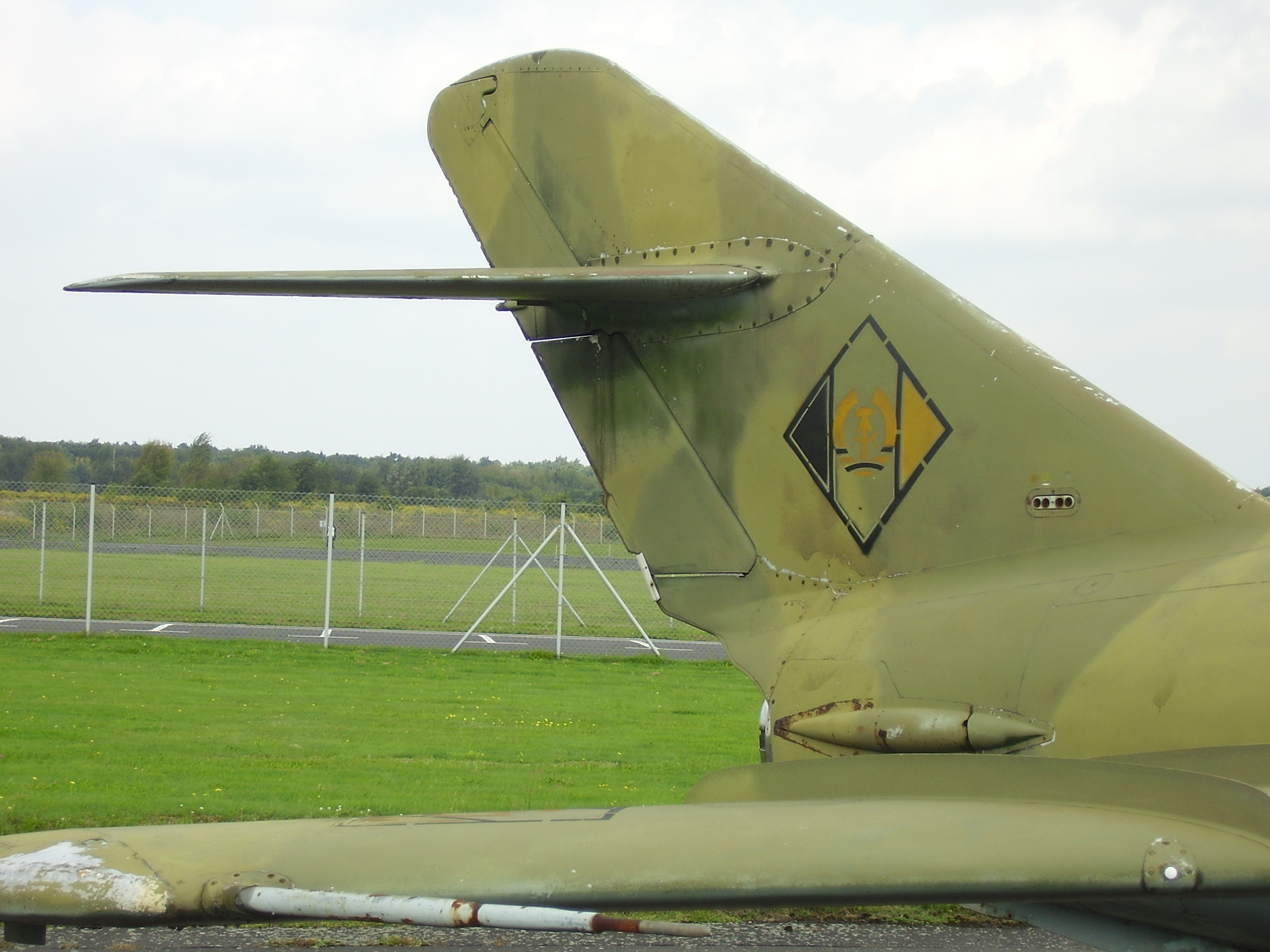 Luftwaffenmuseum der Bundeswehr; Airforce Museum of the Bundeswehr; Berlin-Gatow